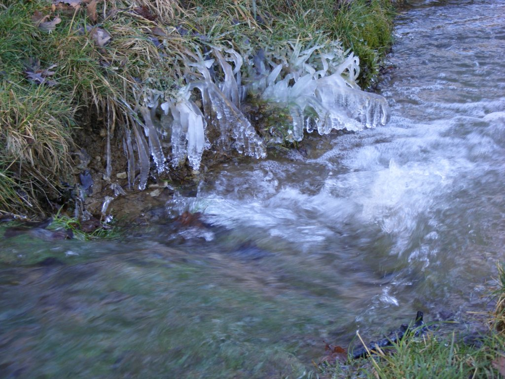 La Chée.